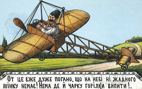 Василий Гулак. "Аероплан. На неби ни жадного шинку..." Почтовая карточка Российской Империи.